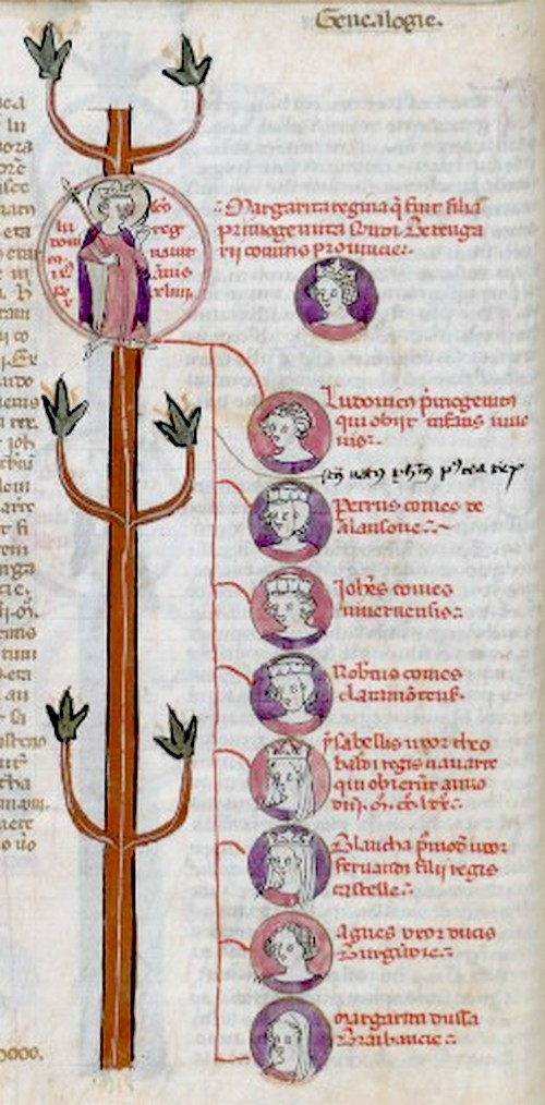 Arbre généalogique